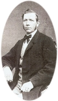 Swedish organ builder Per Larsson Åkerman (founder of Åkerman & Lund Orgelbyggeri AB), 1826-1876